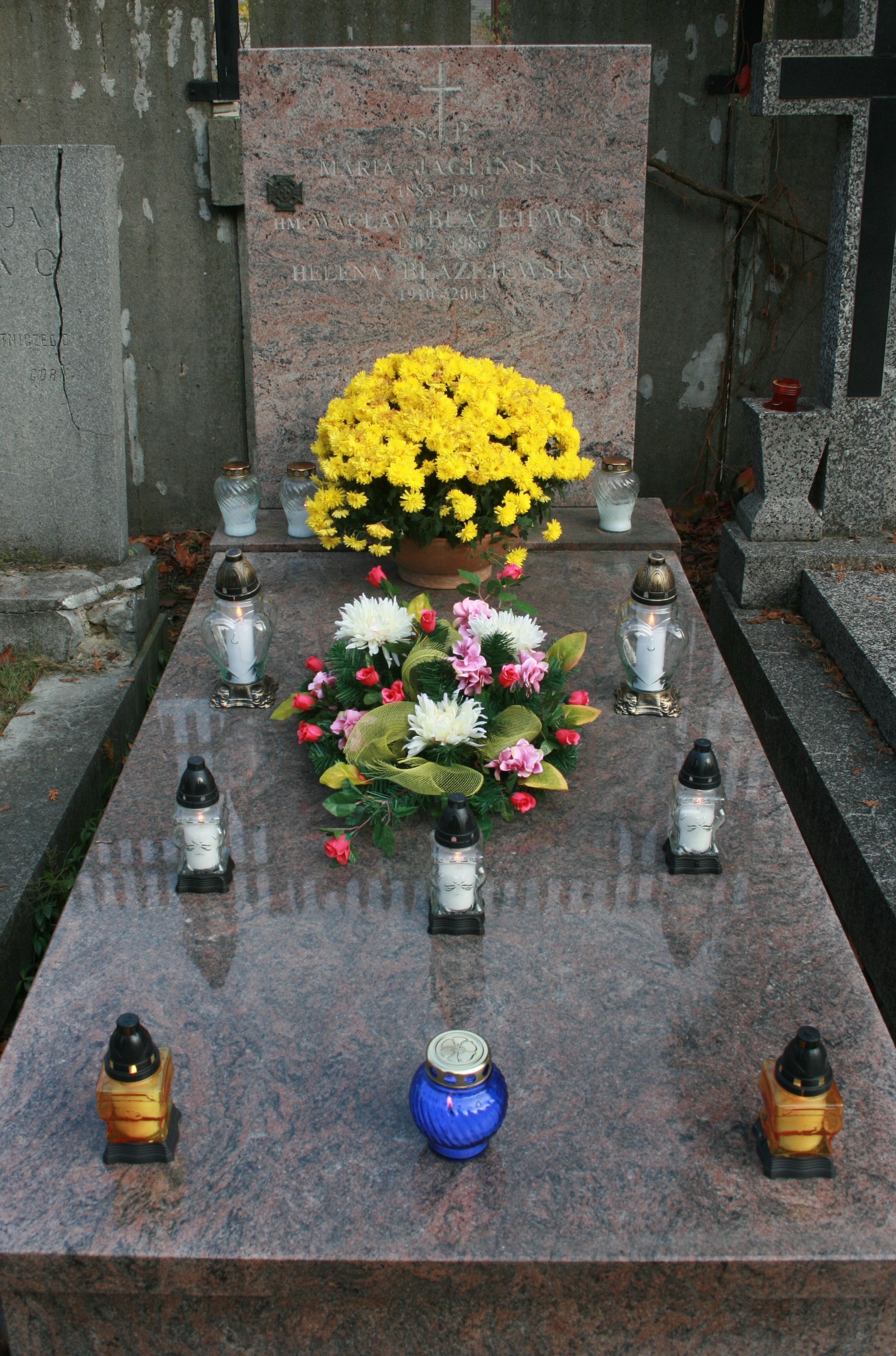 Grób rodzinny Wacława Błażejewskiego na Cmentarzu Wojskowym na Powązkach